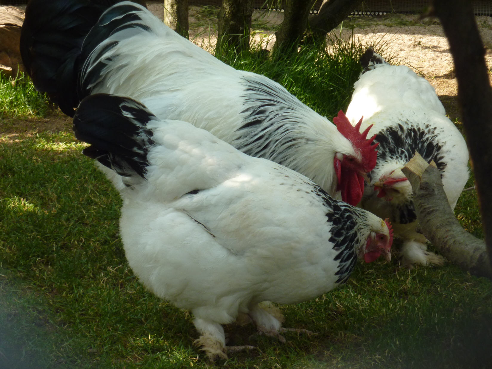 Sundheimer